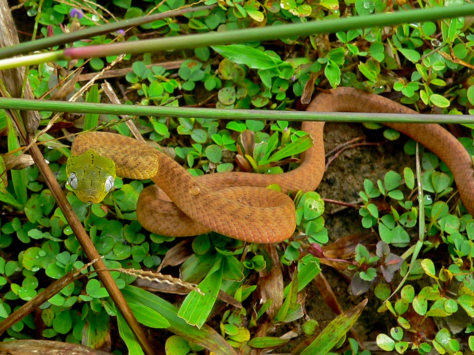 Khao Yai NP, THAILAND